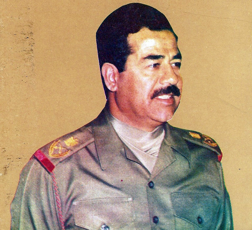 Iraqi president Saddam Hussein